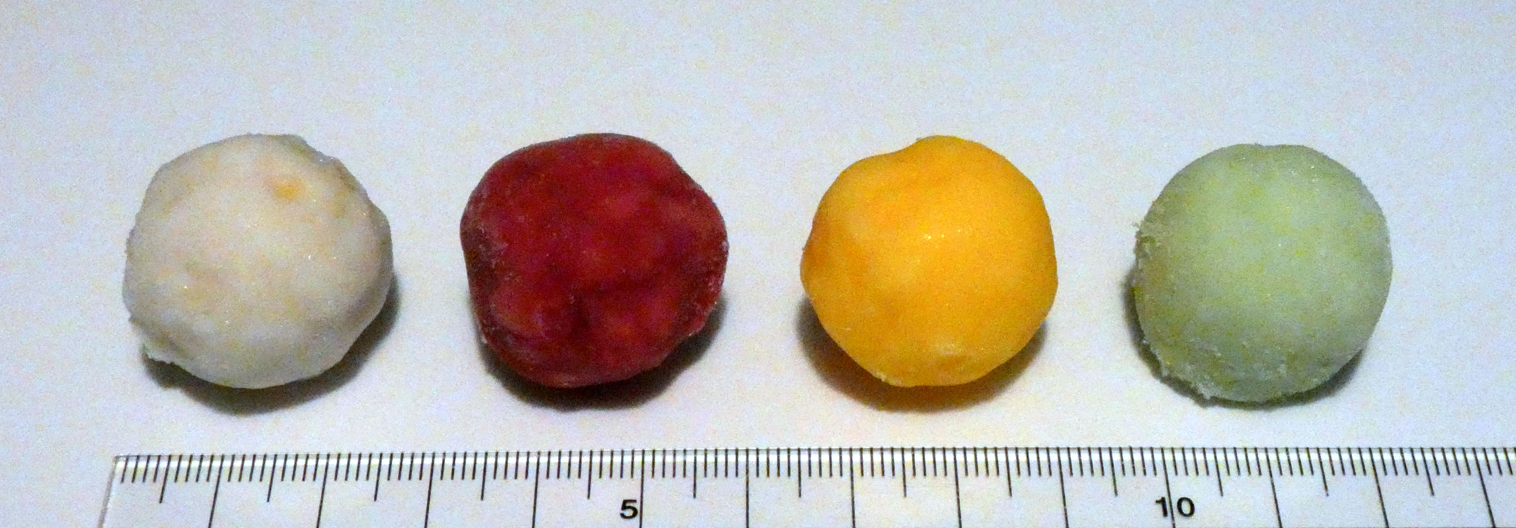 アイスの実（白いカフェオレ、濃いぶどう、濃いみかん、大人のシャルドネ）